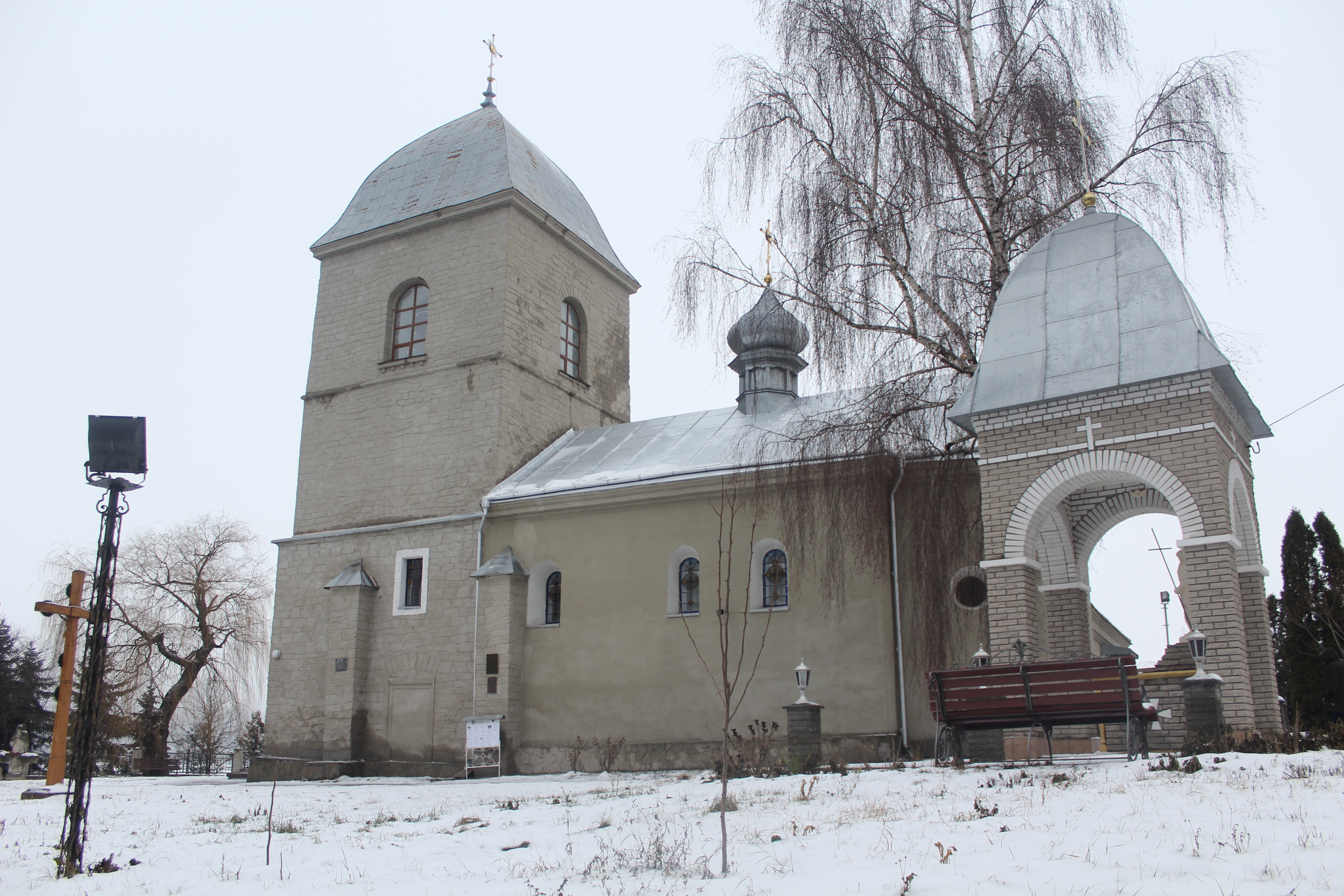 Здвиженська (Надставна) церква, Тернопіль, вул. Над Ставом, 16